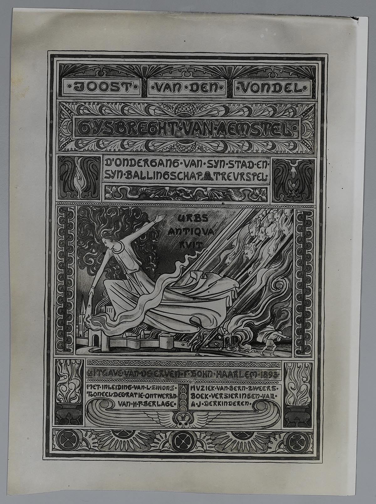 Het titelblad van de Gijsbrecht van Aemstel van Joost van den Vondel. Een uitgave uit 1893.